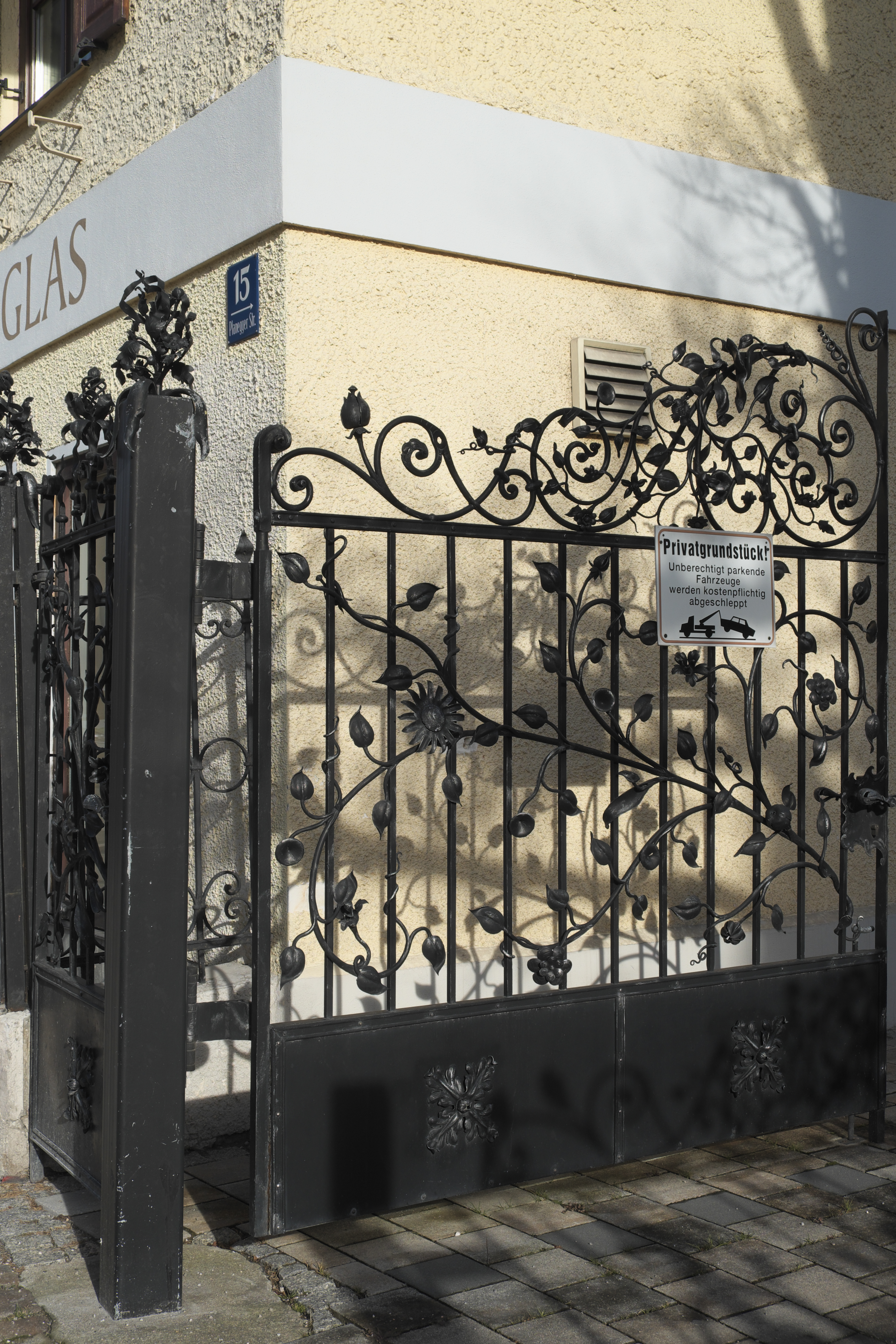 Ehemaliges Bauernanwesen, Planegger Straße 15, in Pasing im Stadtbezirk Pasing-Obermenzing in München (Bayern/Deutschland)